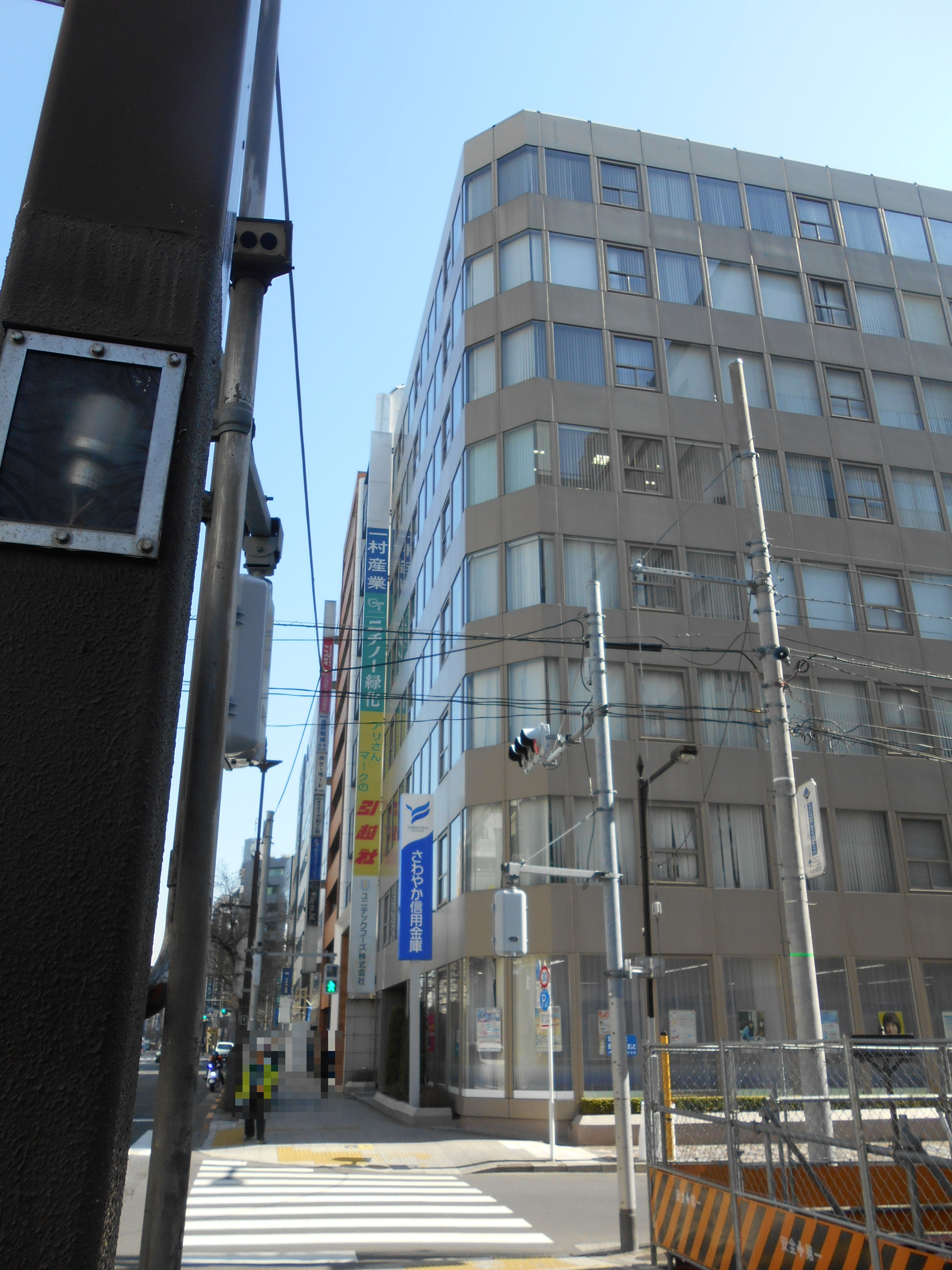 岡谷ビルディング、東京都中央区日本橋小伝馬町